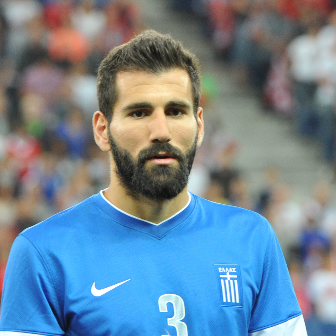 Freundschaftliches Länderspiel Österreich - Griechenland am 14. August 2013 in Salzburg: Dimitris Siovas